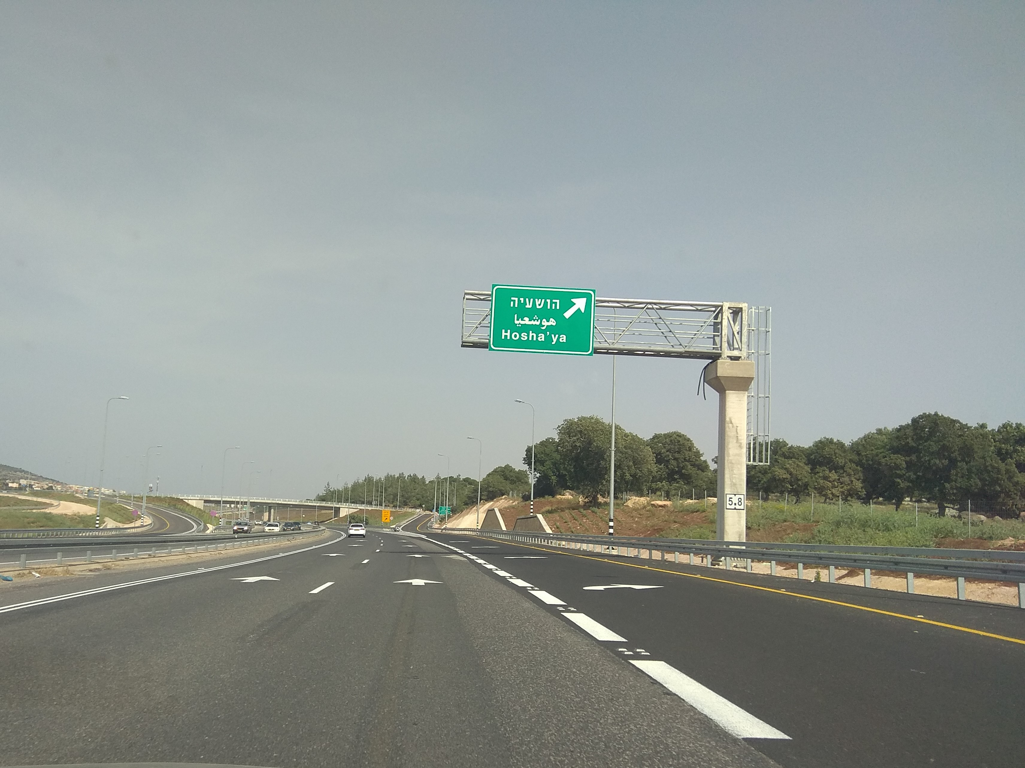 כביש 77 ליד מחלפון הושעיה